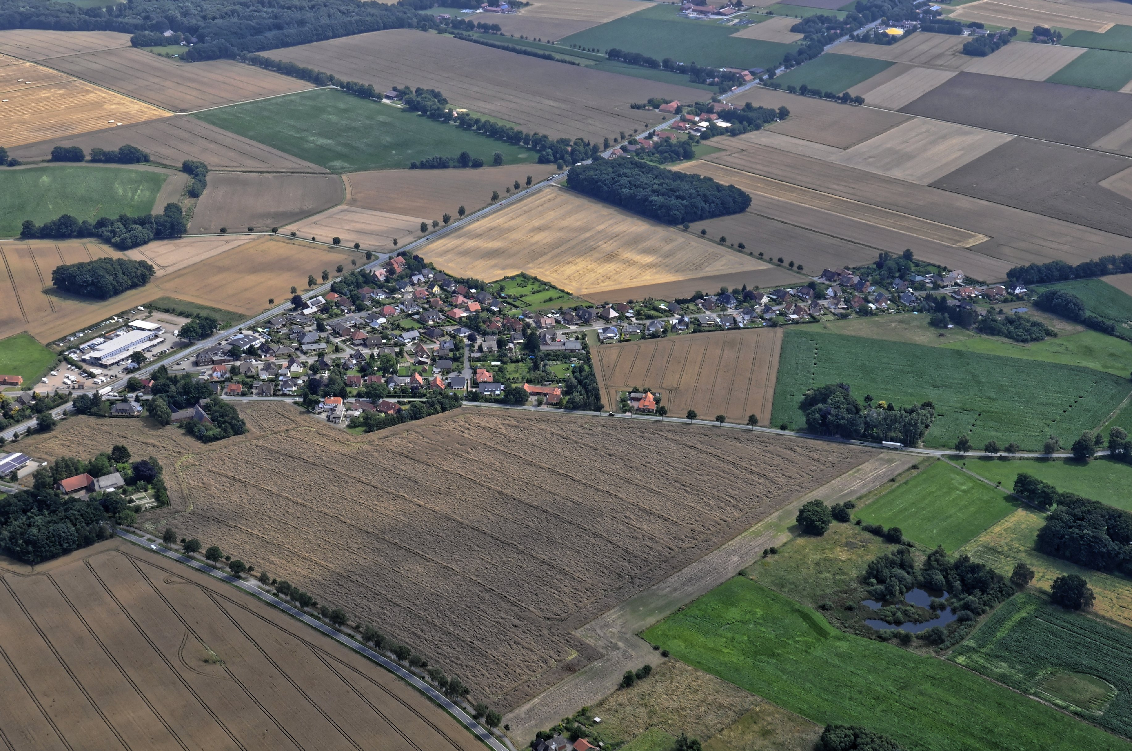 Bilder vom Flug Nordholz-Hammelburg 2015: Blick von Westen auf Heiligenfelde.